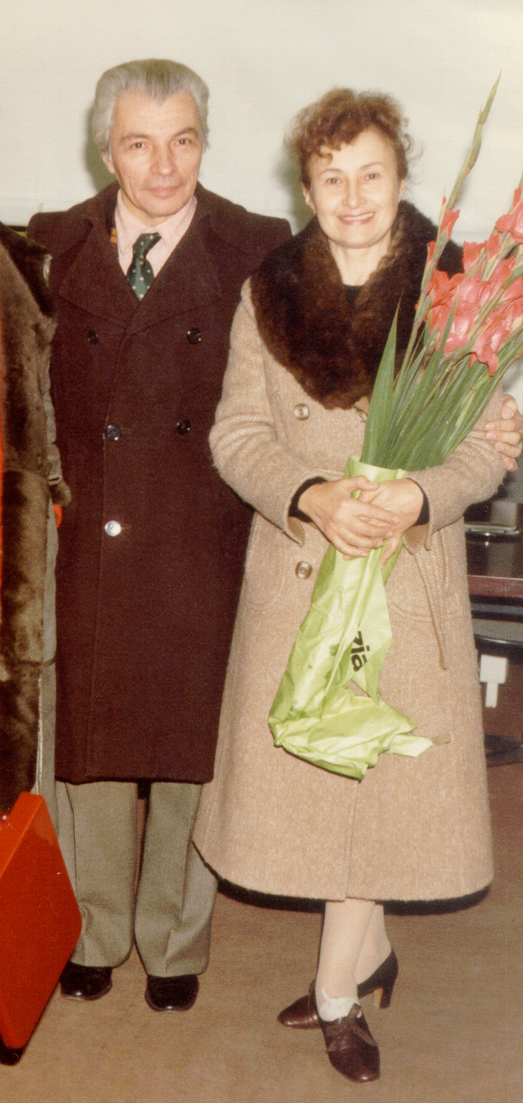 Liliana Merlo con Alberto Testa a Giulianova (1981). Fonte file: opera propria Data: 2009 Autore: Archivio Liliana Merlo Licenza: pubblico dominio